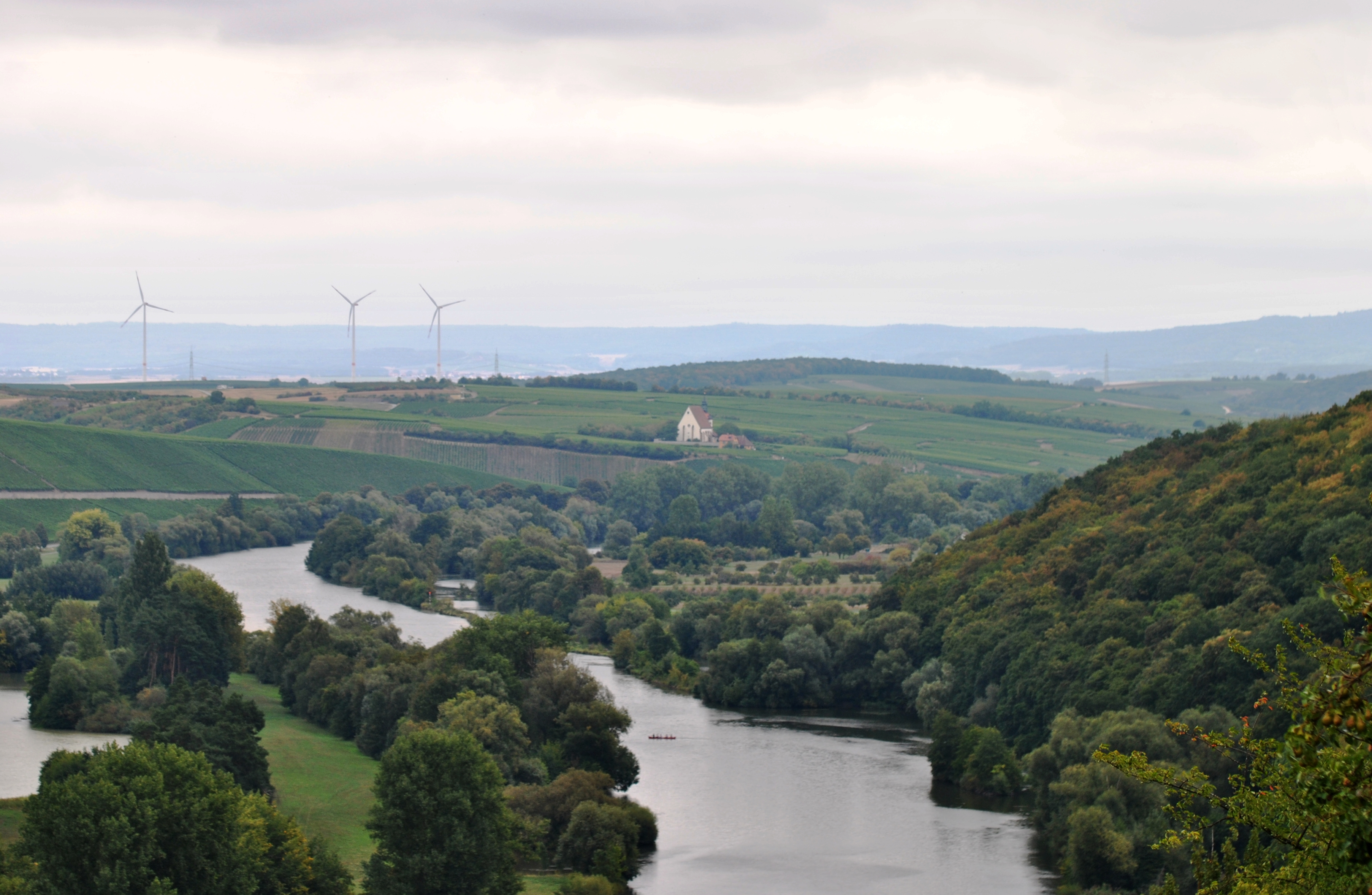 Volkacher Mainschleife, voraus Maria im Weingarten